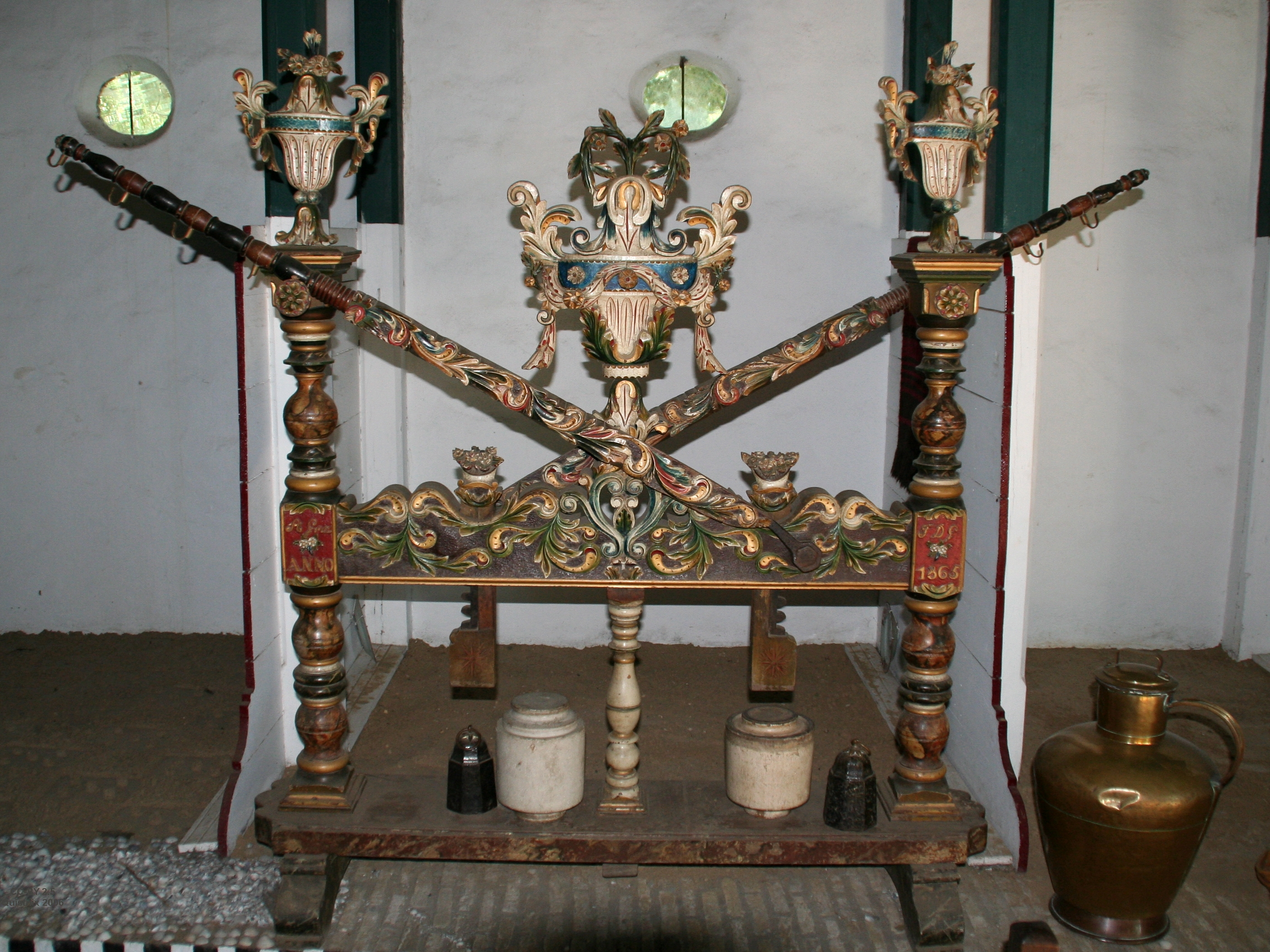 Antieke kaaspers, Nederlands Openluchtmuseum. Eigen foto. Antique cheese press in Open Air Museum, Arnhem